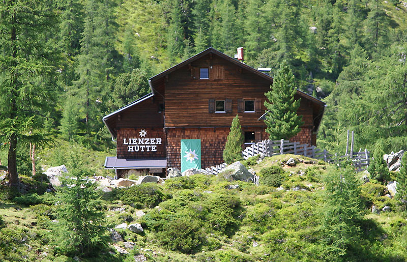 Die Lienzer Hütte 1977 m ü. A